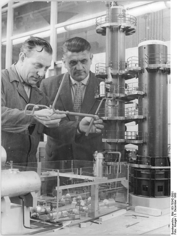 Zentralbild-Krueger Krue-Qu 5.12.1960 Neue Konstruktionsformen für Chemieanlagen Zu sogenannten Modellkonstruktionen sind die Ingenieure des VEB Schwermaschinenbau "Karl Liebknecht" in Magdeburg bei der Konstruktion von Chemieanlagen übergegangen. Es handelt sich um eine plastische Darstellung der Projekte aus Kunststoff, Metall und Holz im Maßstab 1:20. Für verschiedene Teile der zu bauenden Anlage , wie z.B. das oft umfangreiche Rohrnetz, erübrigen sich jetzt die zeitraubenden technischen Zeichnungen. Bei der Konstruktion einer Erdölaufbereitungsanlage für den VEB Mineralölwerk Lützkendorf verringert sich die Konstruktionszeit um 16 500 Stunden. UBz. Der Leiter des Modellbaus Hans Hesse und Oberingenieur Ullrich (rechts) am Modell einer Chemieanlage."